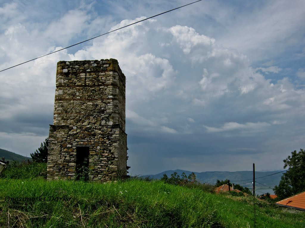 Саат Кулата во Стар Дојран